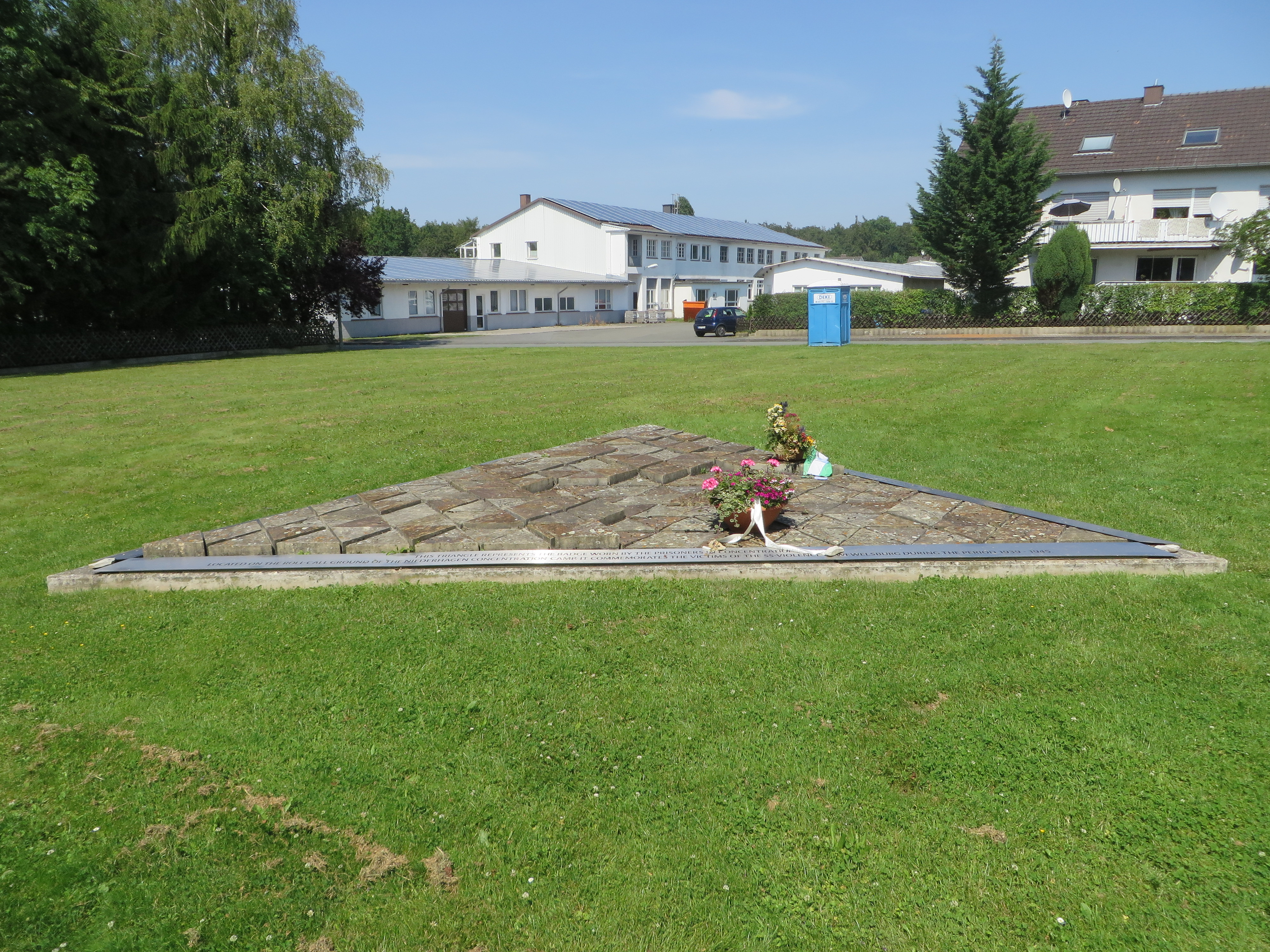 Mahnmal auf dem ehemaligen Appelplatz des KZ Niederhagen